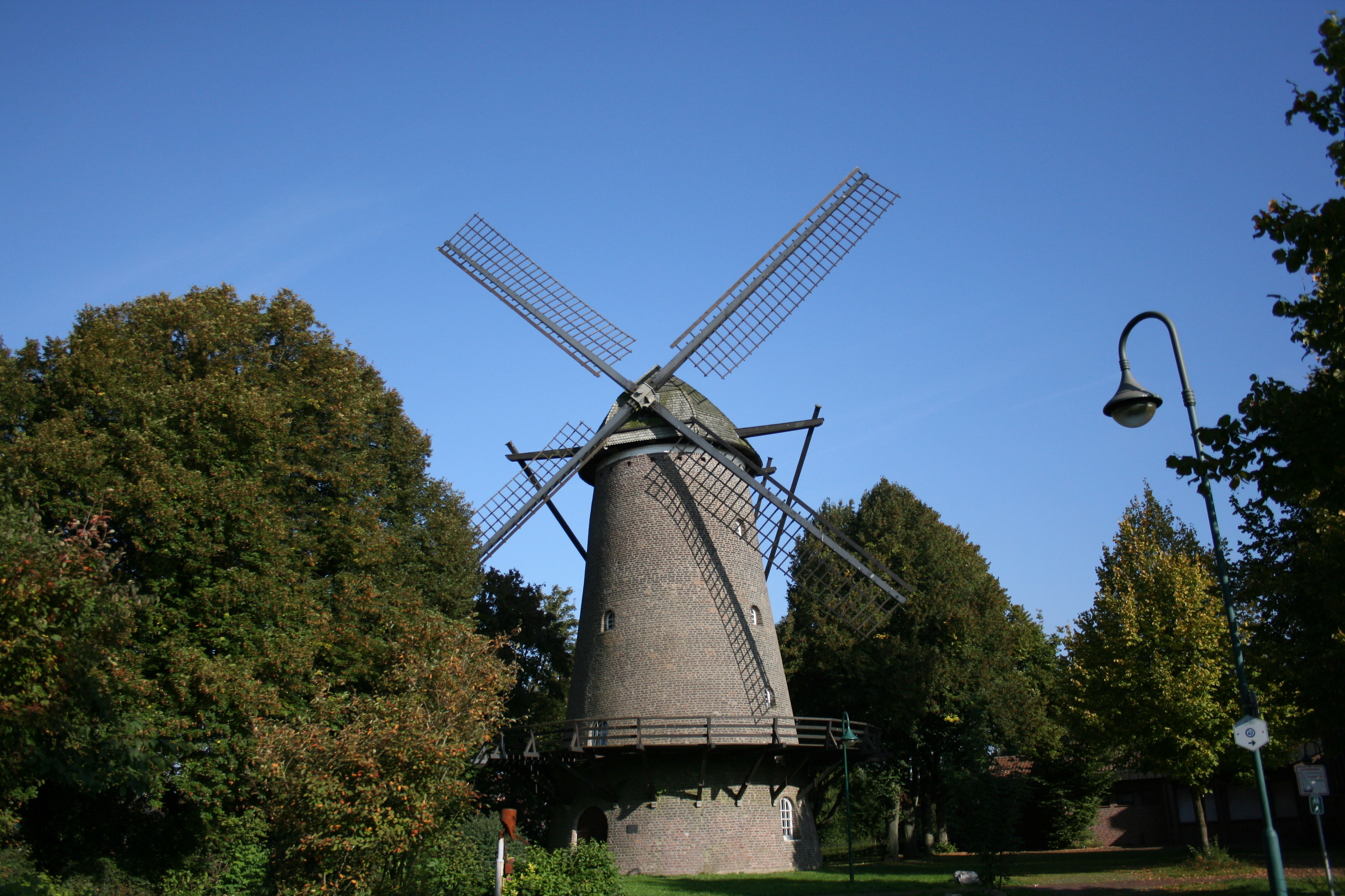 Gommansche Mühle am Stadtgraben in Sonsbeck